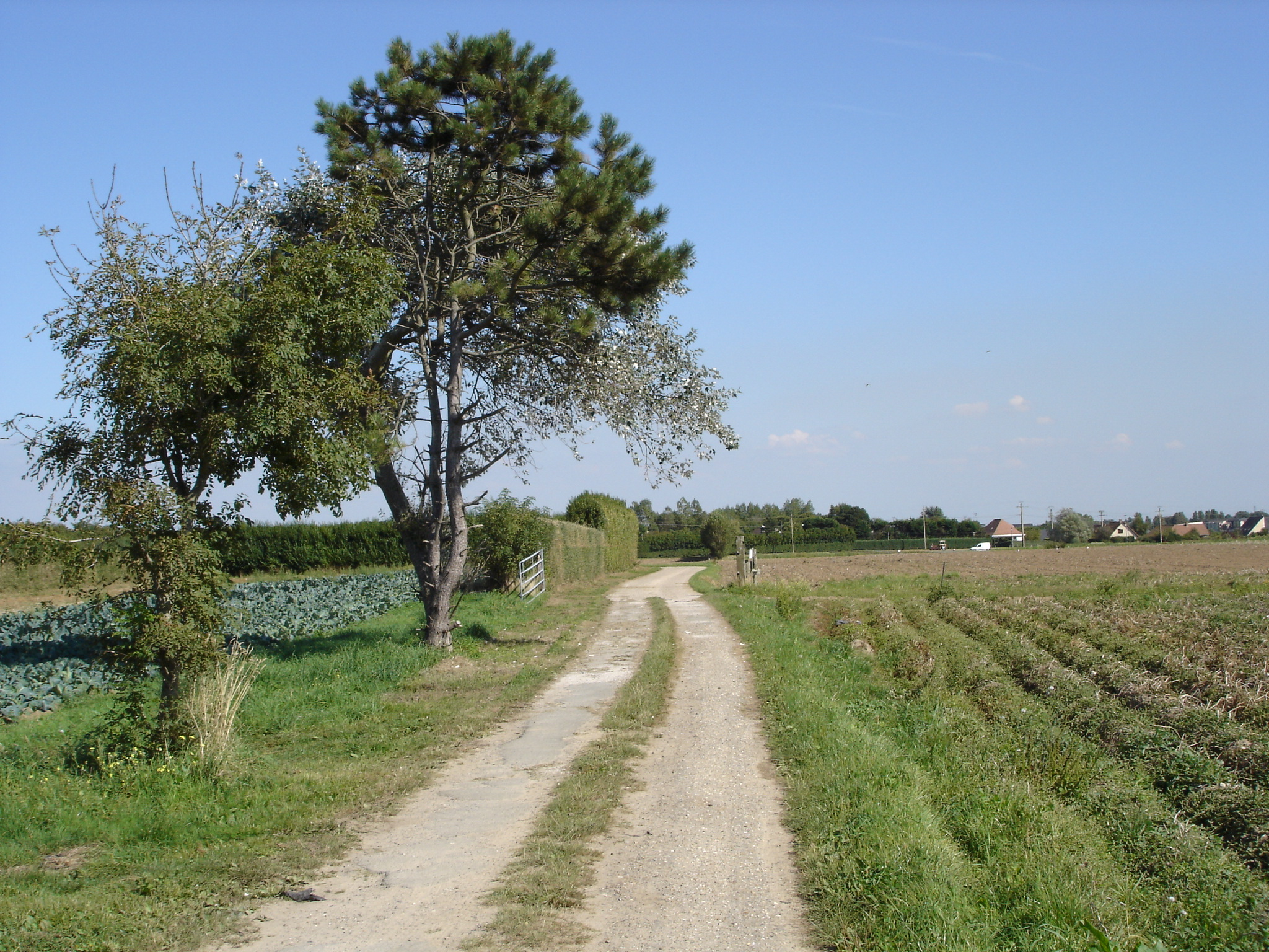 Vue de la campagne entre la D 340 et la mer à Octeville-sur-Mer (Seine-Maritime) -- Photo amateur prise par moi-même